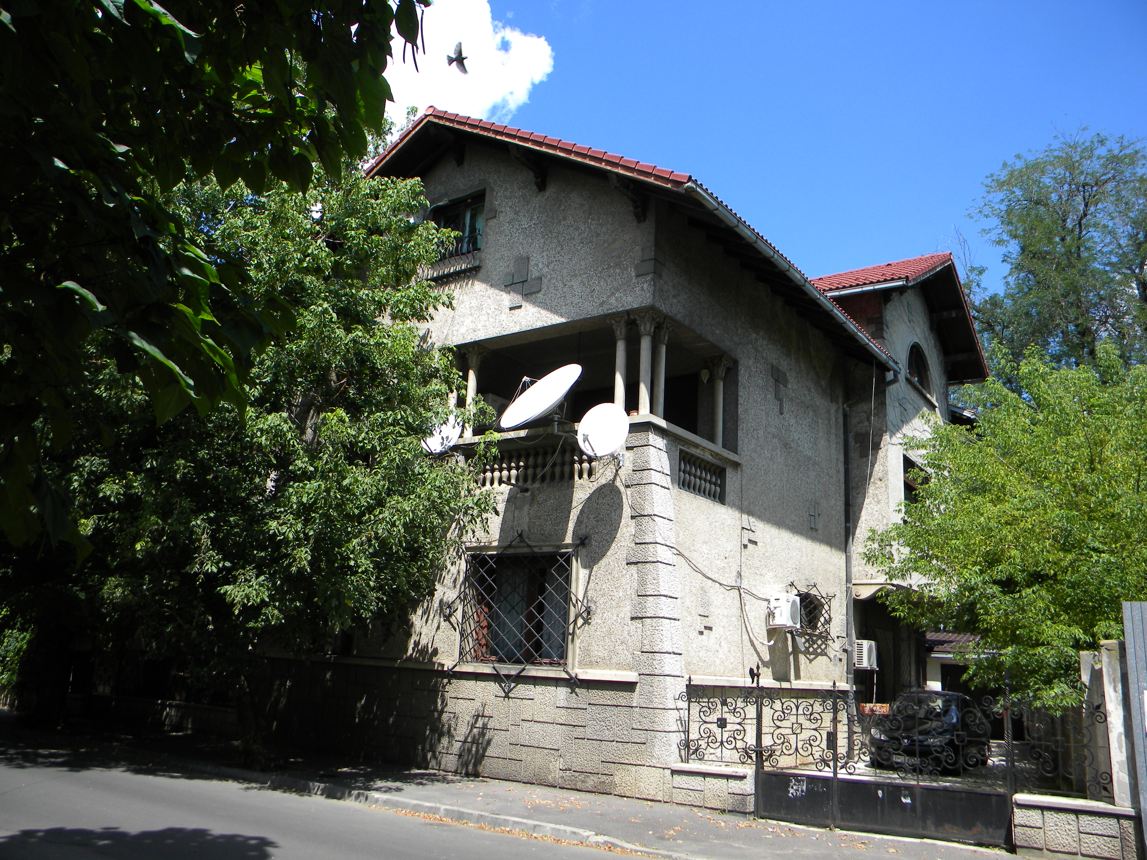 Bucuresti. Romania. Casa pe Str. Popa Soare nr. 55, sect. 3. B-II-m-B-19458